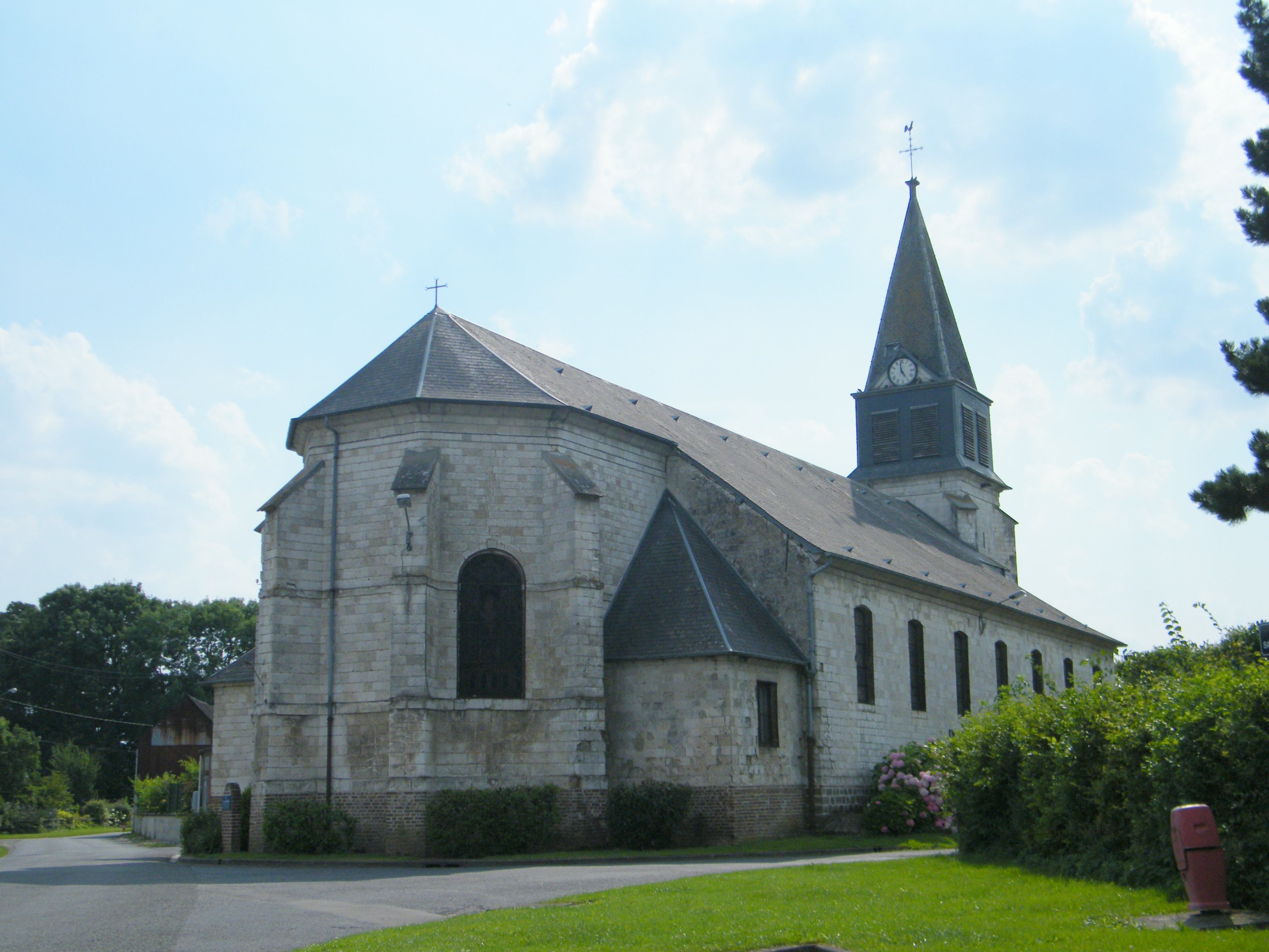 L'église Saint-Aubin de Talmas.